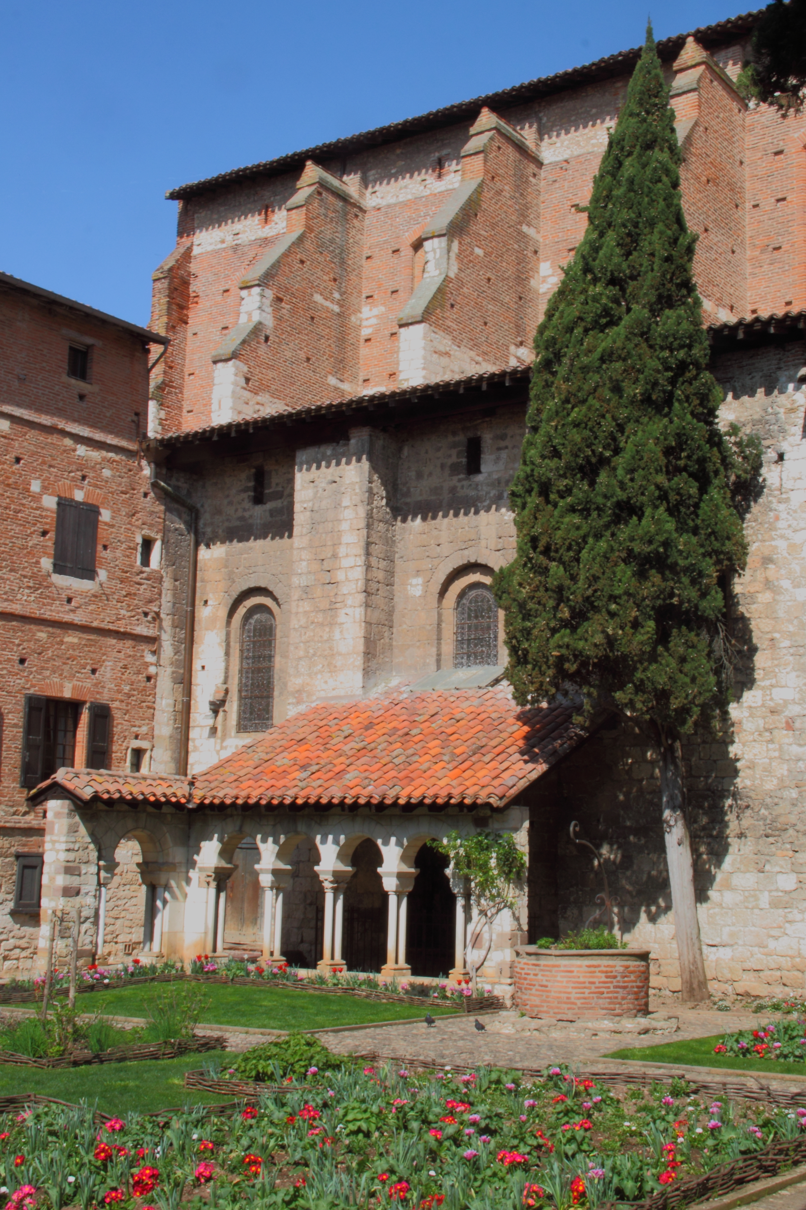 Collégiale Saint-Salvy (Albi)